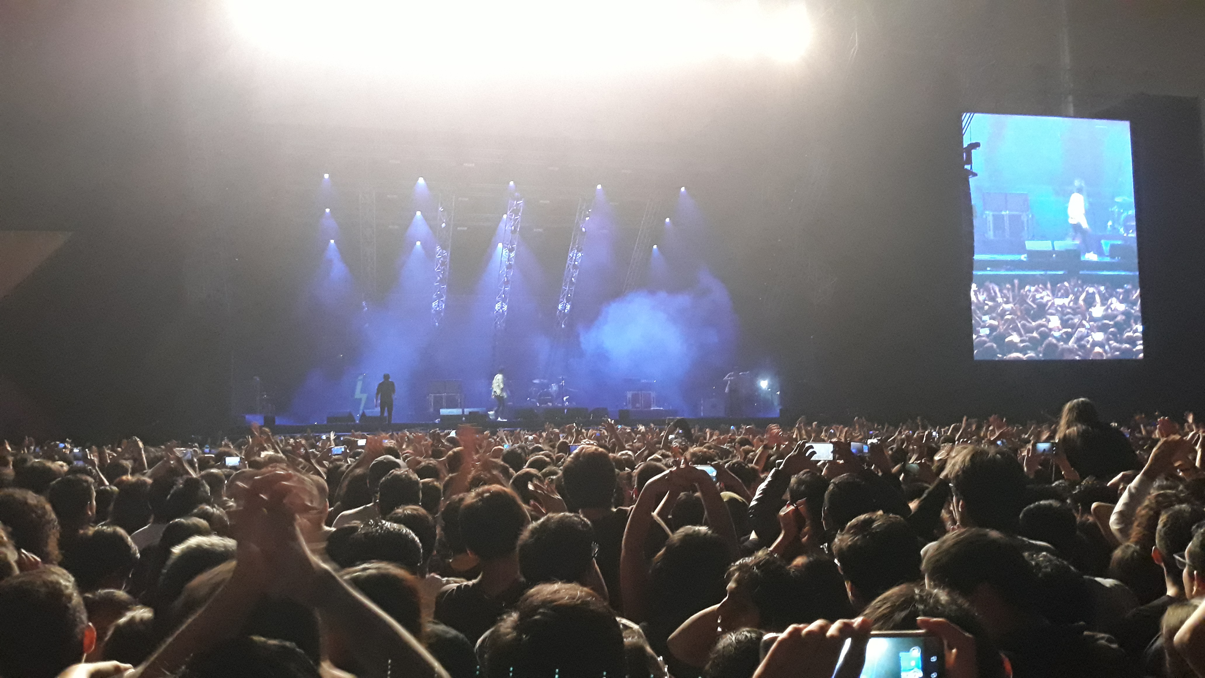 The Strokes en el VIvo x El Rock 2019 en Lima, Perú.